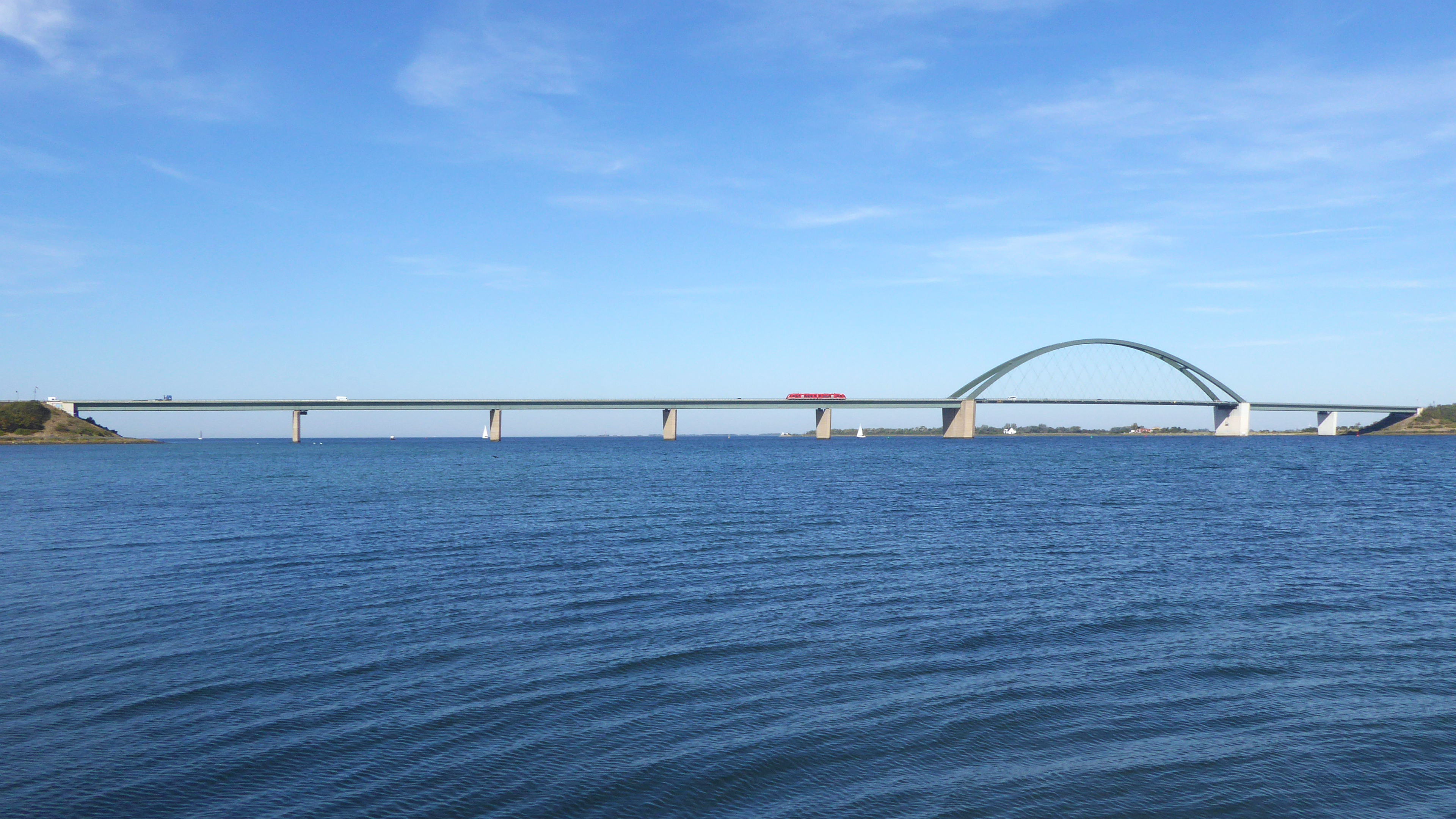 Fehmarnsundbrücke von Süden von Großenbrode aus gesehen. Brücke Bj 1963 und seit 1999 unter Denkmalschutz. L 963 m Lichte H 22 m - Foto 2018 Wolfgang Pehlemann P1260991